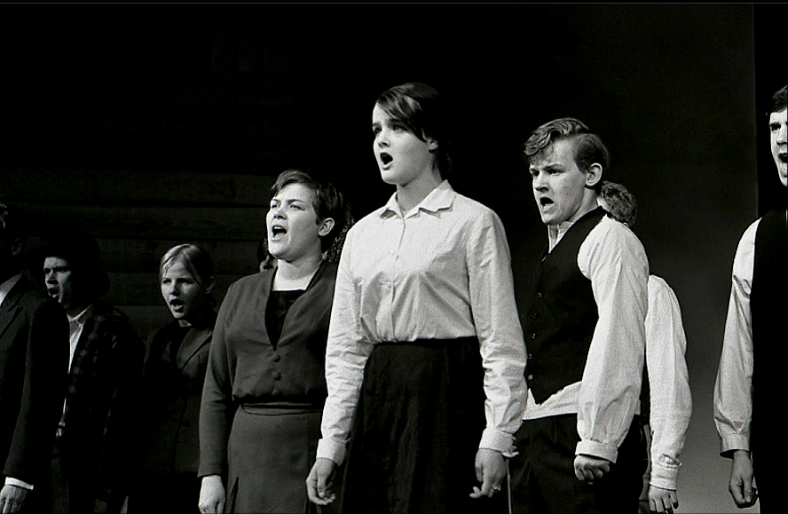 Lapualaisoopperan kuoroa Vanhalla ylioppilastalolla kevättalvella 1966.